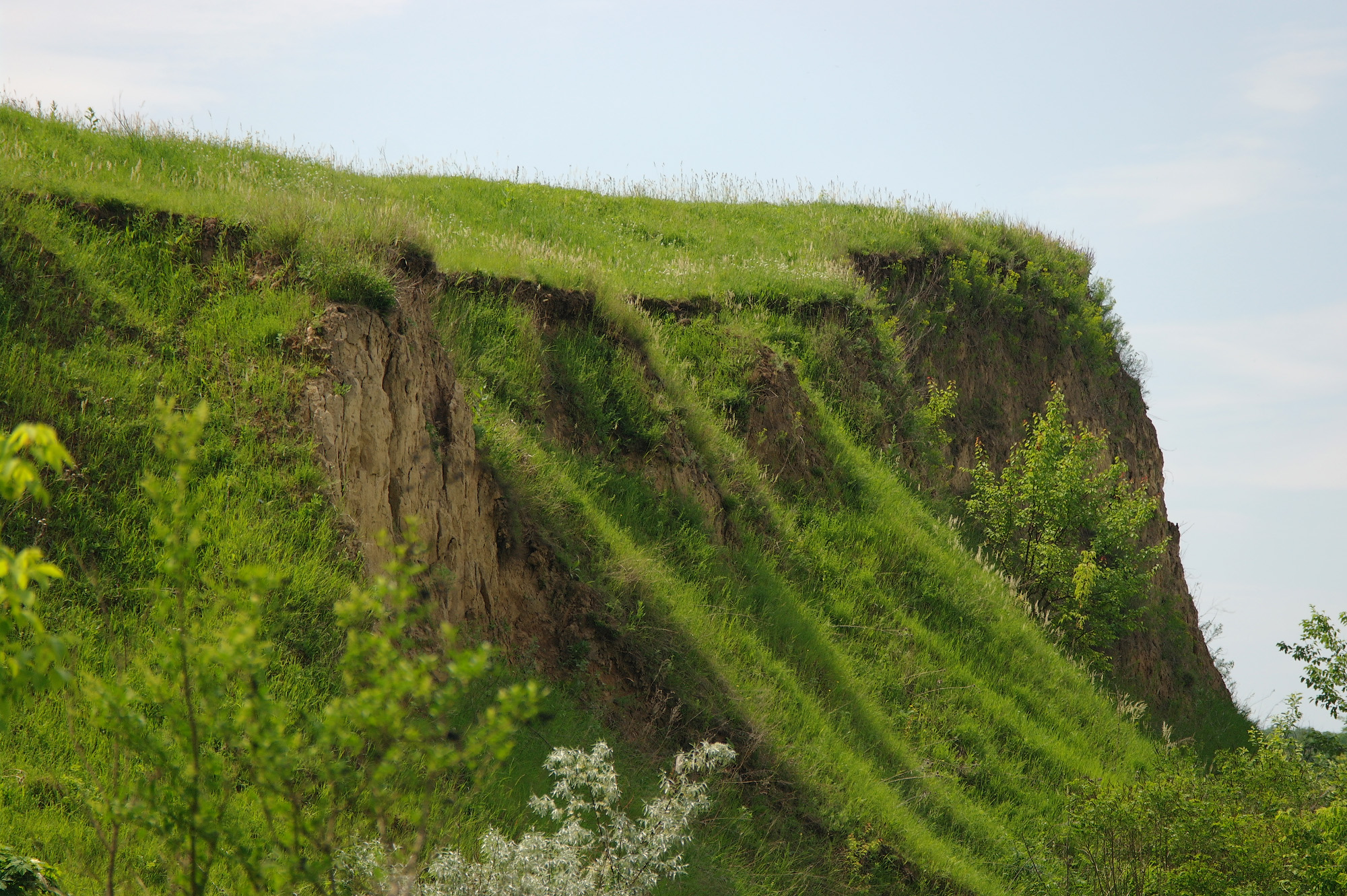 Канівські куести на околиці м.Канів